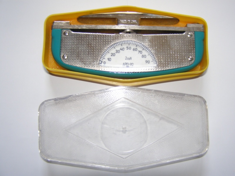 кистьовий динамометр (СРСР)